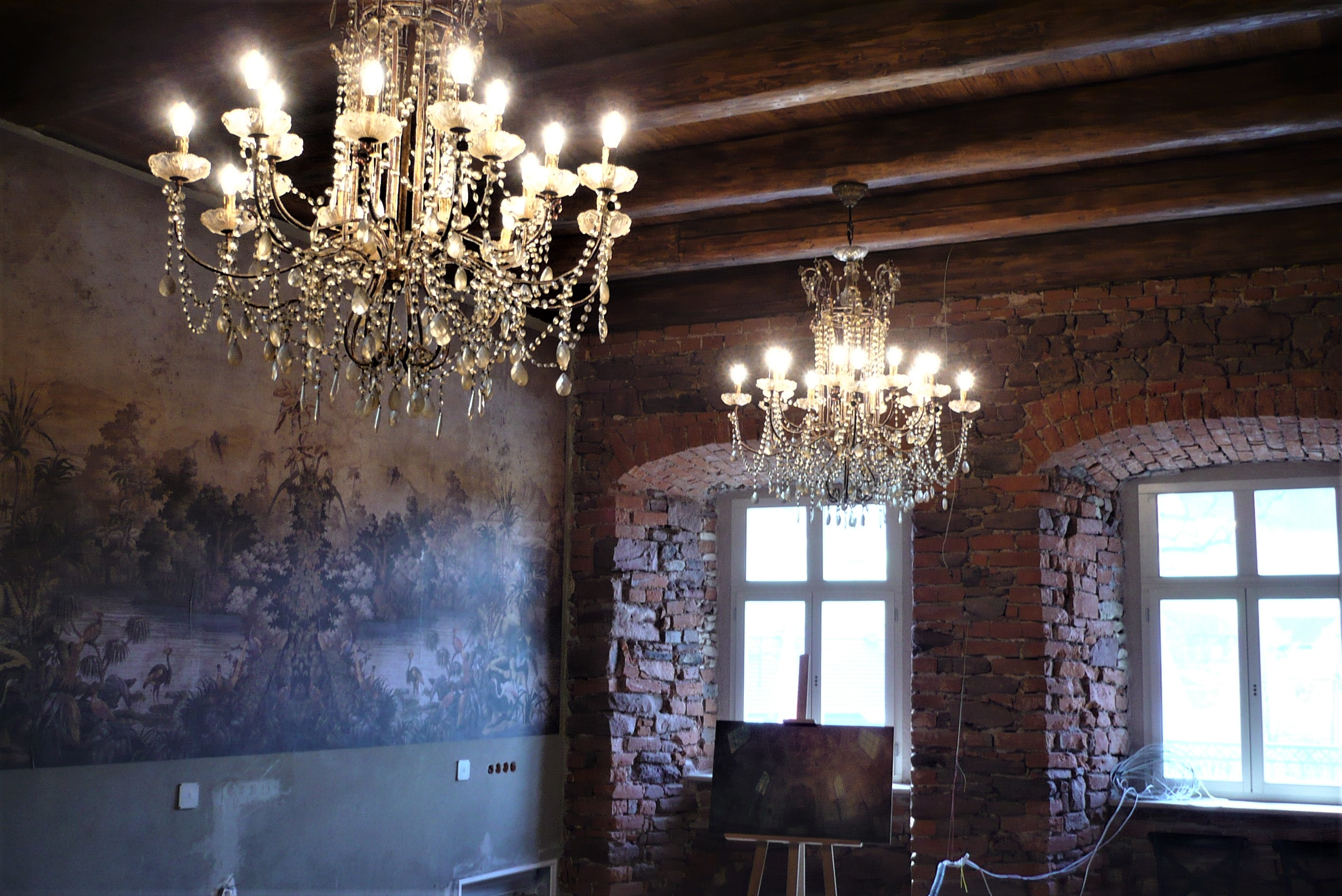 Ścinawka Górna. Sala w budynku bramnym